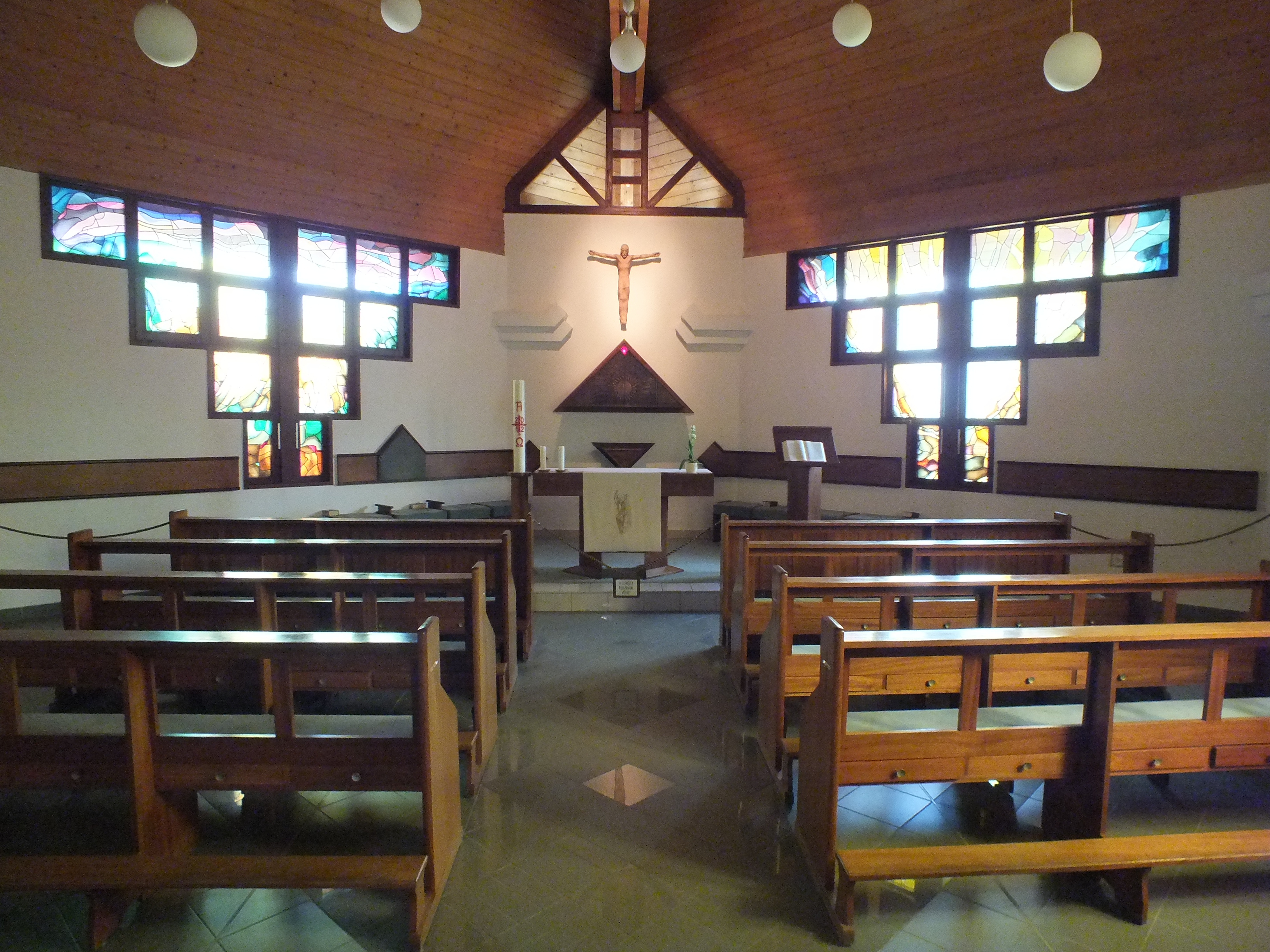 Káposztásmegyeri Szentháromság Plébánia Templomházának a kápolnája